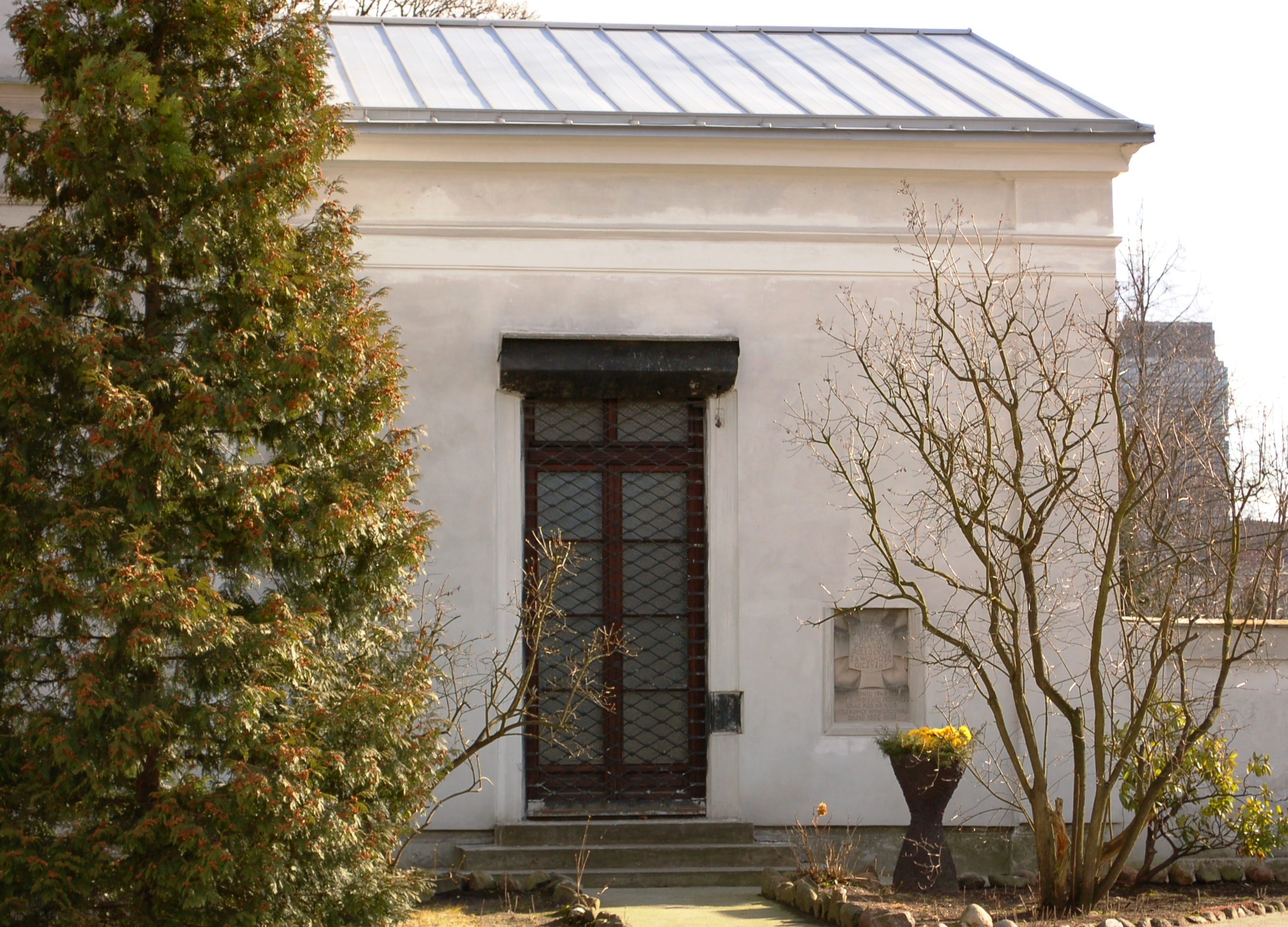 Biernacki-Palast Warschau Wola